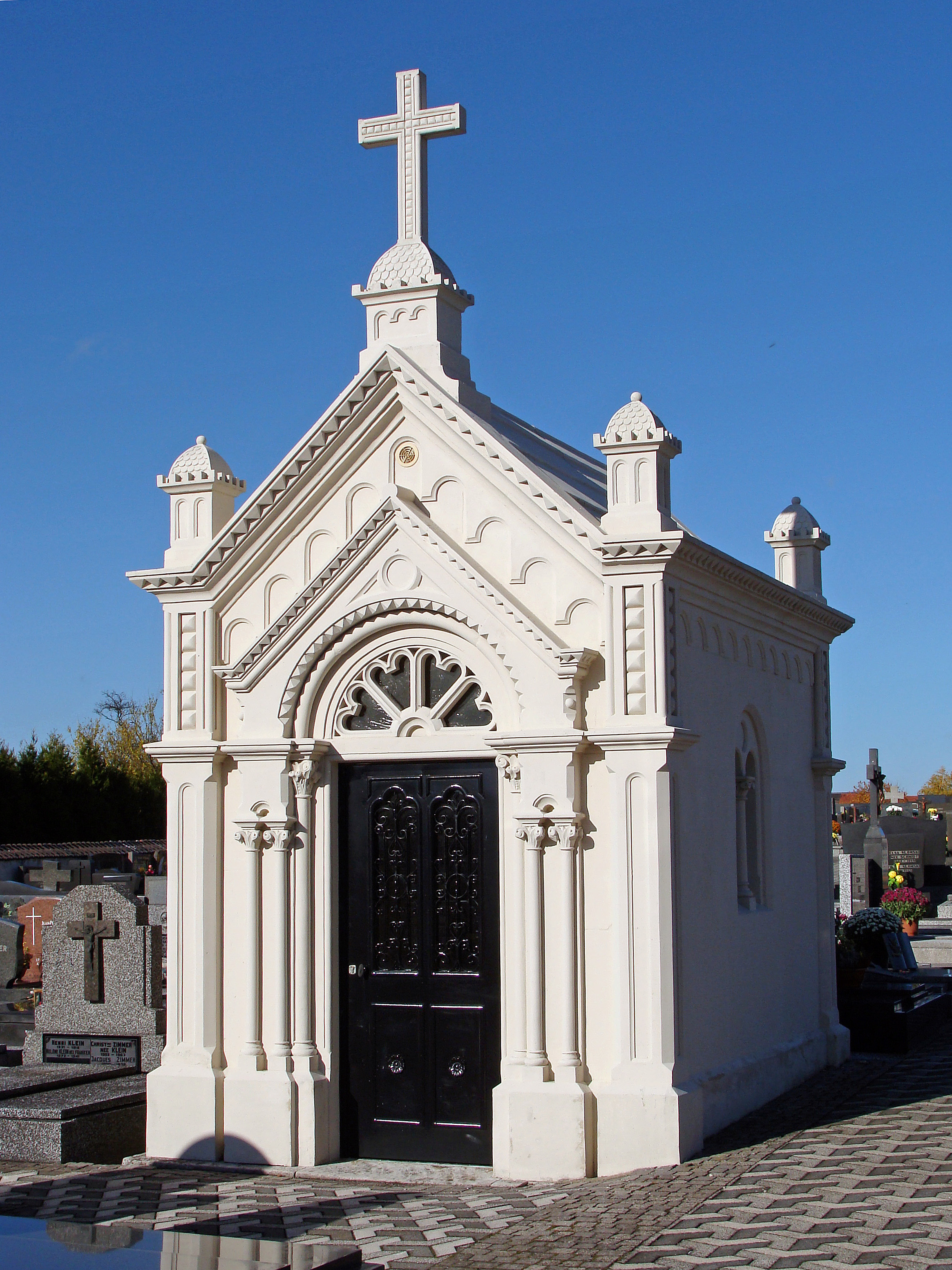 Friedhofskapelle von L'Hôpital (Moselle)